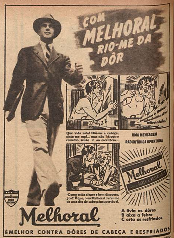 Propaganda do remédio Melhoral na revista "O Cruzeiro".